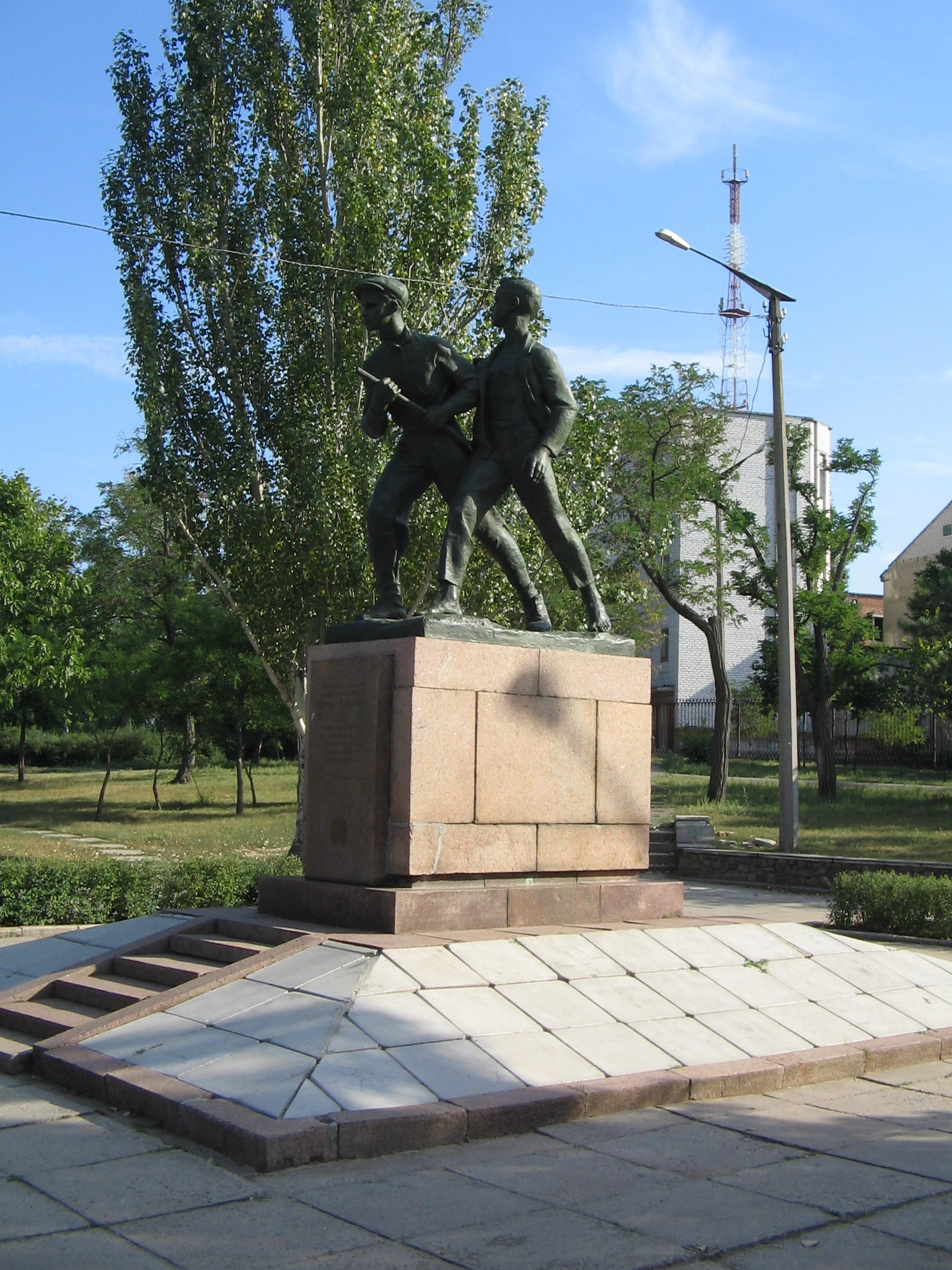 Пам'ятник юним героям В. Хоменку та Ш.Коберу 1942 р. Автори: скульптори Т.Г. Судвіна, А.Б. Князік, архітектор Ю.Б. Тягно), Миколаїв, Піонерський сквер